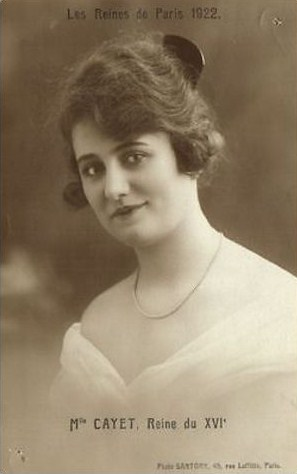 La Reine du XVIème arrondissement 1922 Mlle Cayet